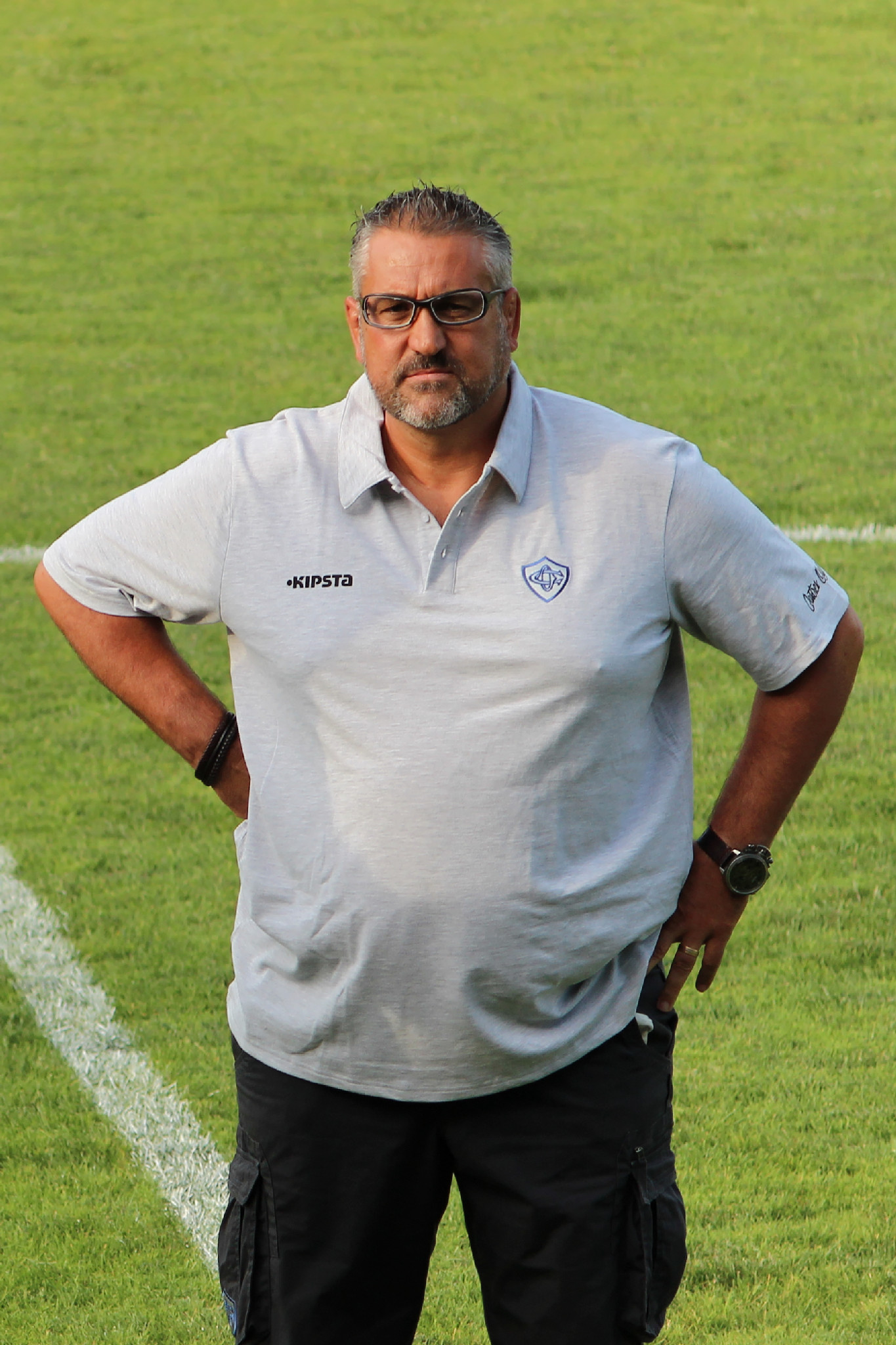 Joueurs du Castres Olympique lors de la présentation de l'équipe pour la saison 2015-2016